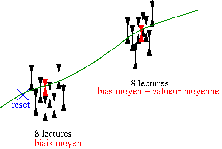 Échantillonnage de Fowler: reset, N lectures, intégration, N lectures.